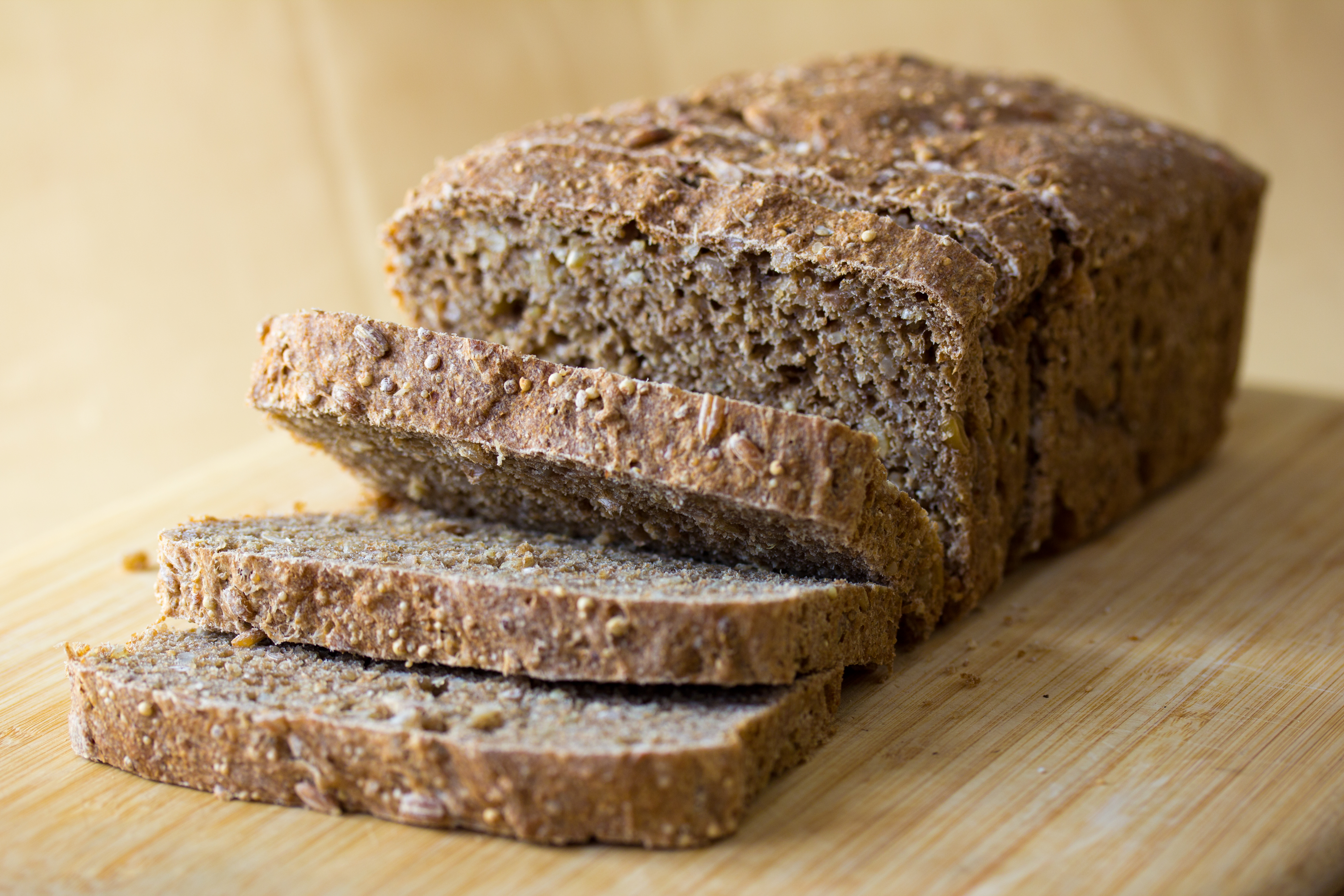 Ciemny chleb pełnoziarnisty English | polski | +/−